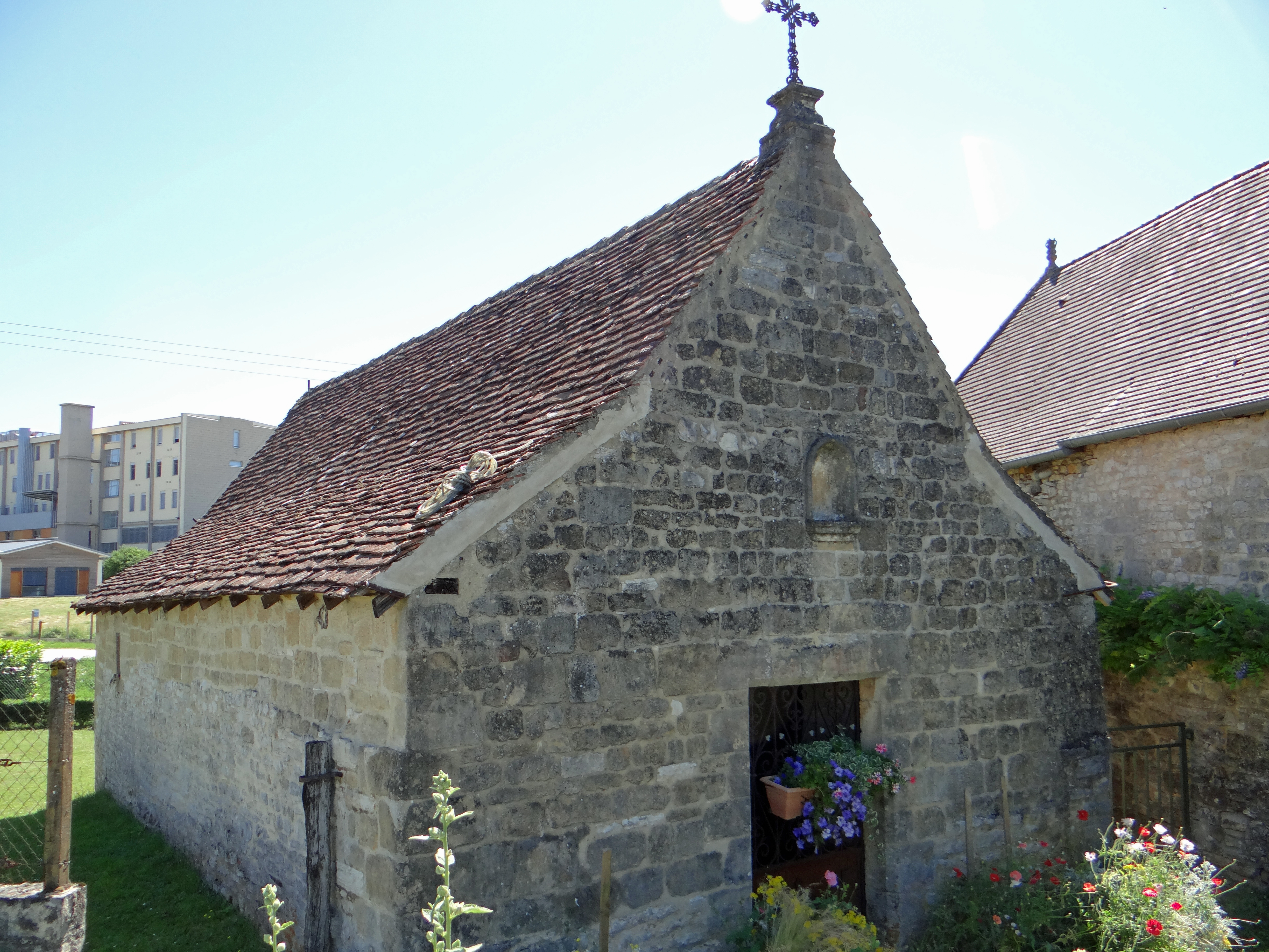 Gourdon - Chapelle de la Maladrerie - Façade et porte d'entrée